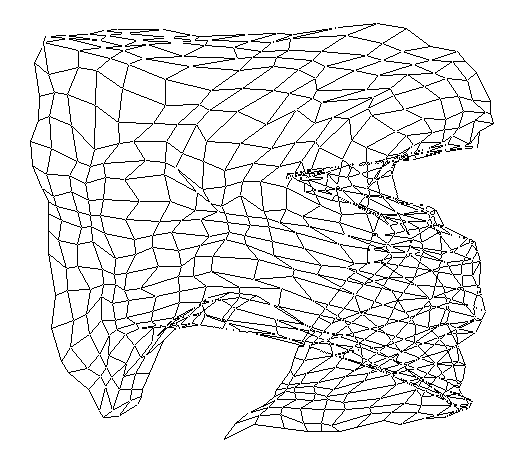 Som - nach 1000 Schritten